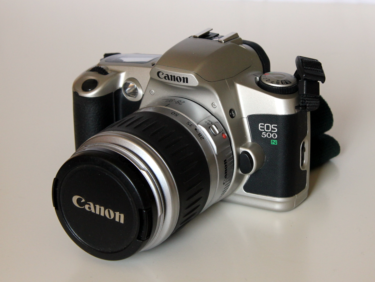 Canon EOS 500N mit 4-5,6/28-90mm Objektiv